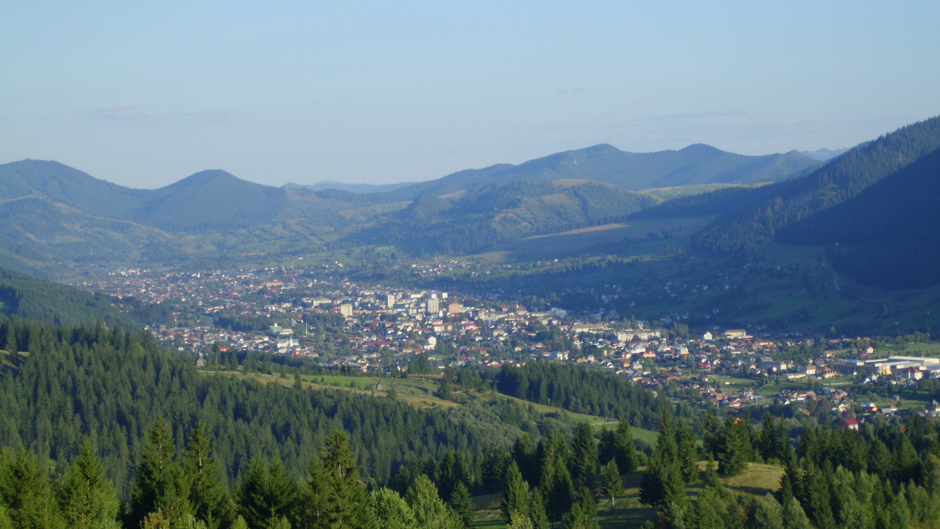 Municipiul Campulung Moldovenesc, vedere de pe Obcina Feredeului